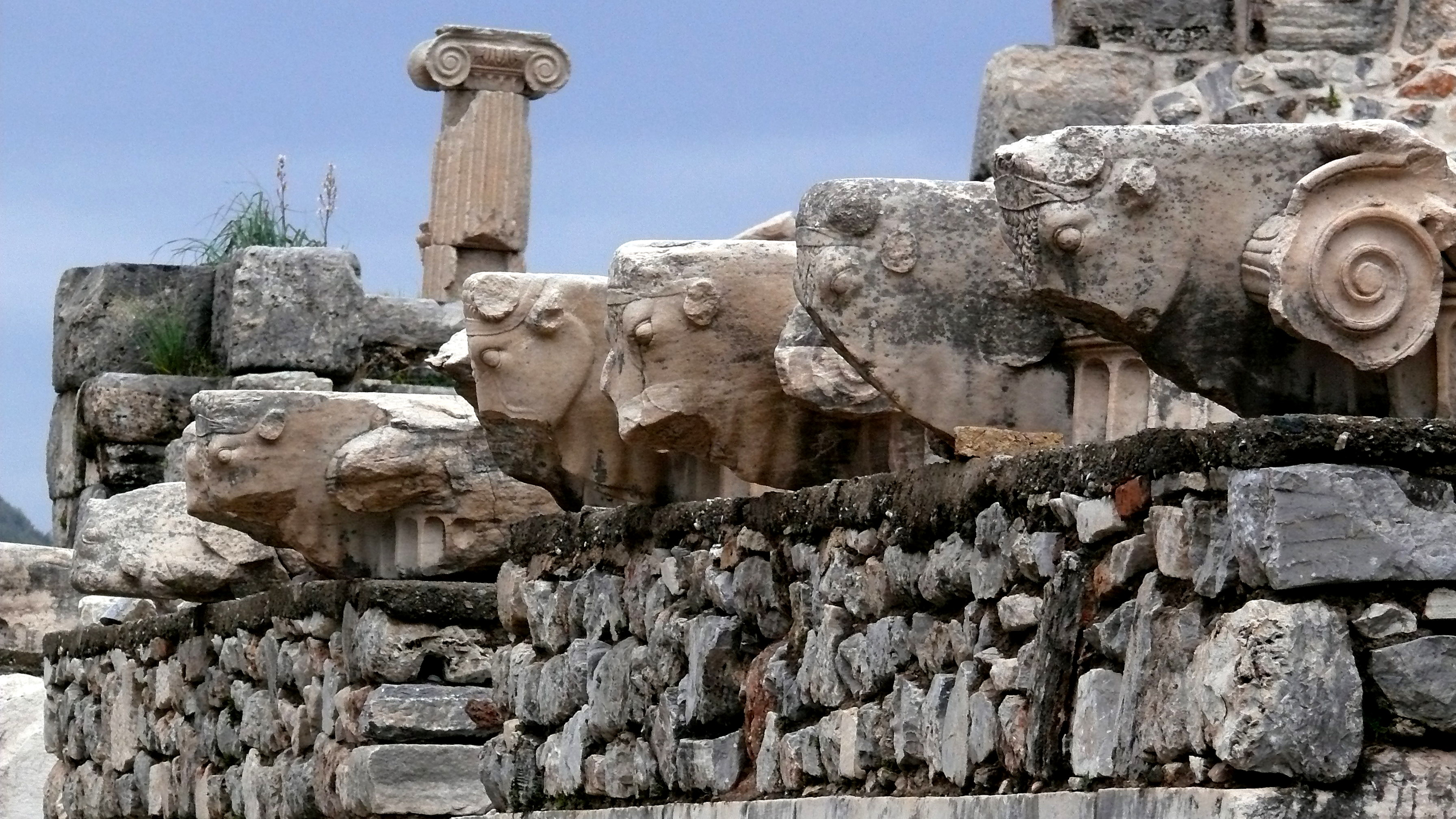 Gotische Kapitelle mit Darstellung eines Stierkopfes